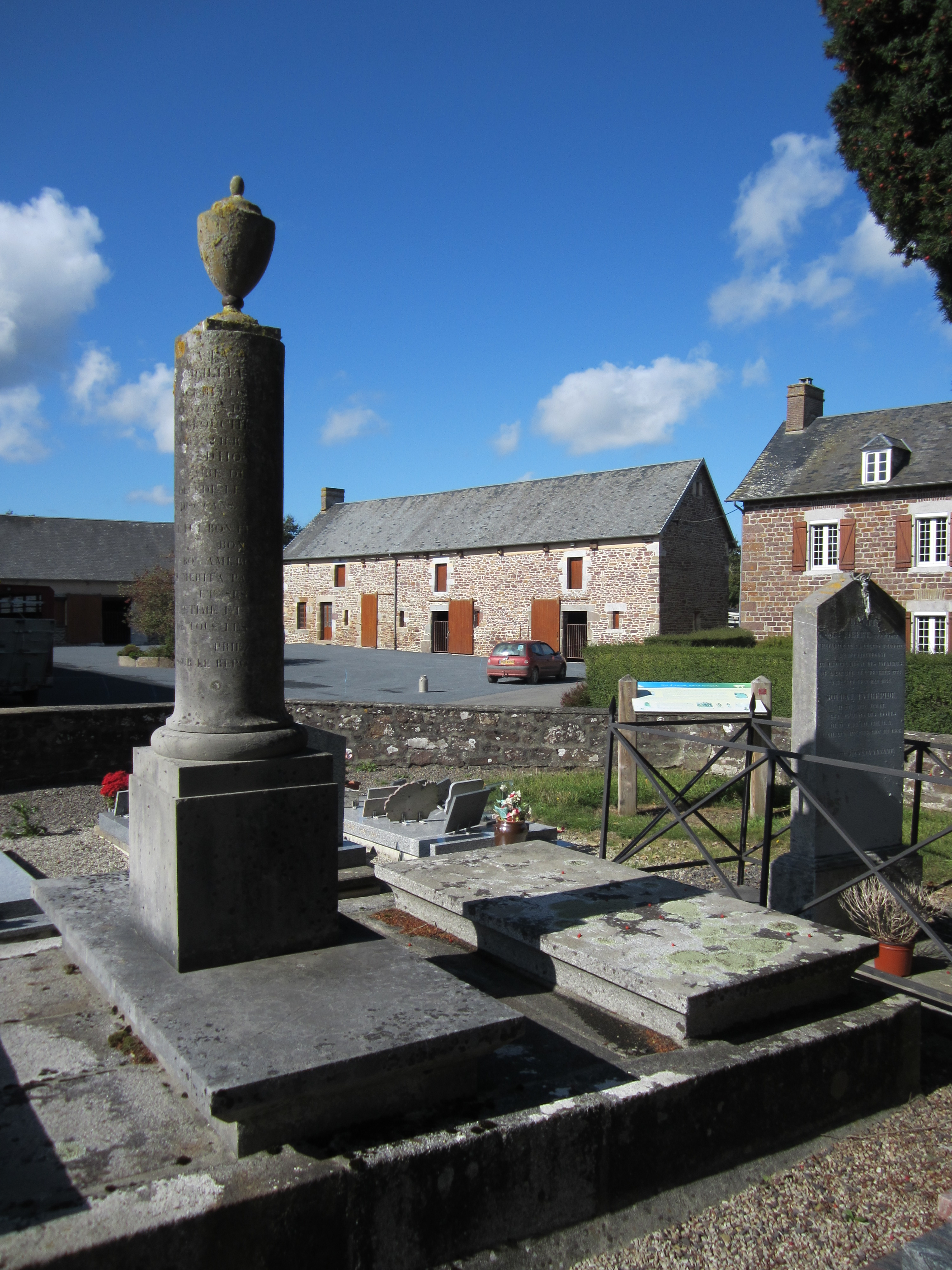 Bourey, absorbé par Cérences, Manche